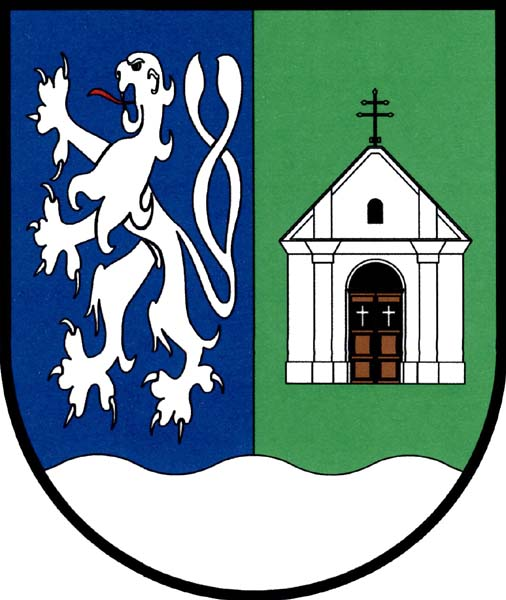 Znak obce Velká Jesenice v okrese Náchod.